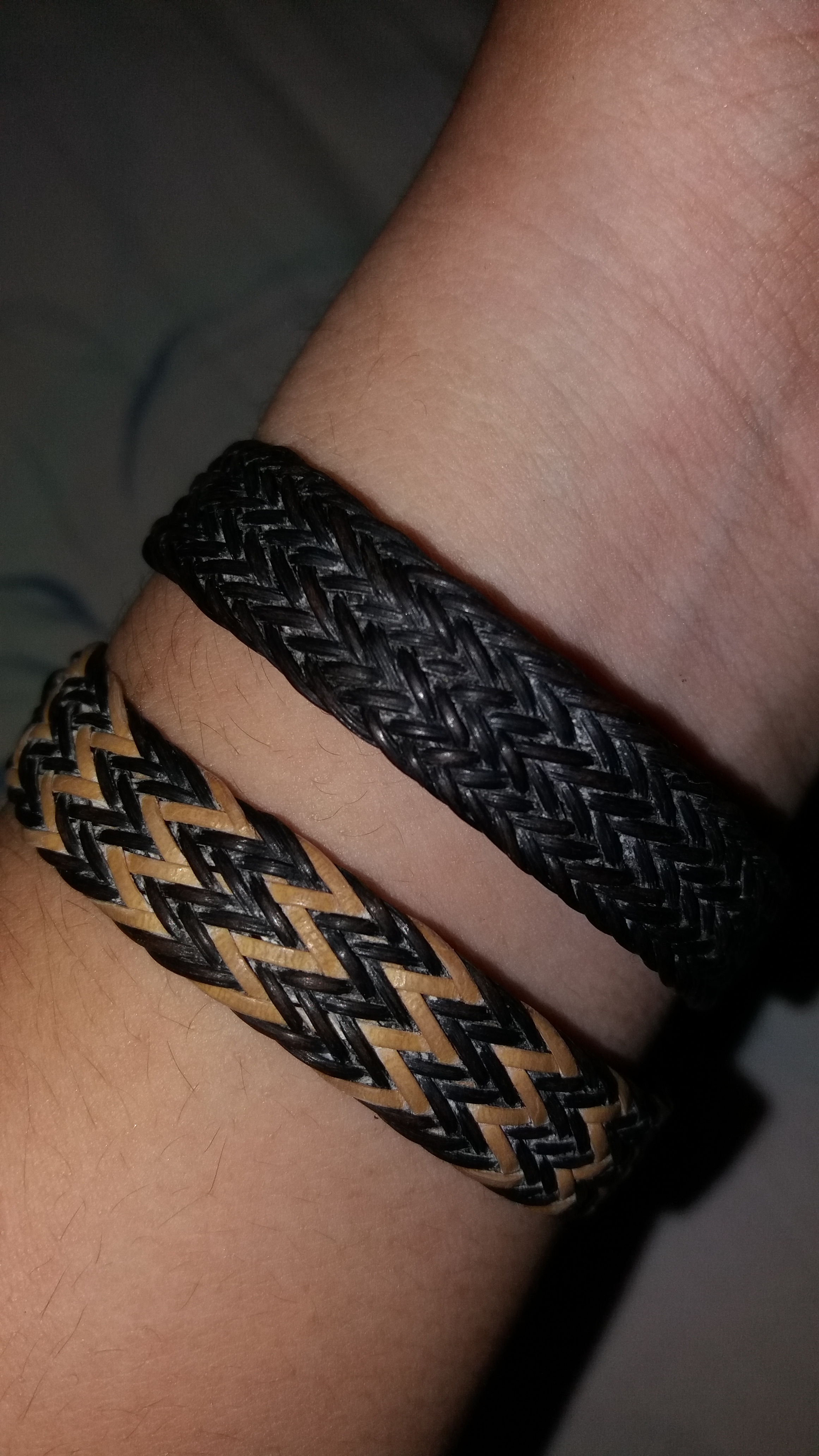 Gelang anyaman khas Papua.